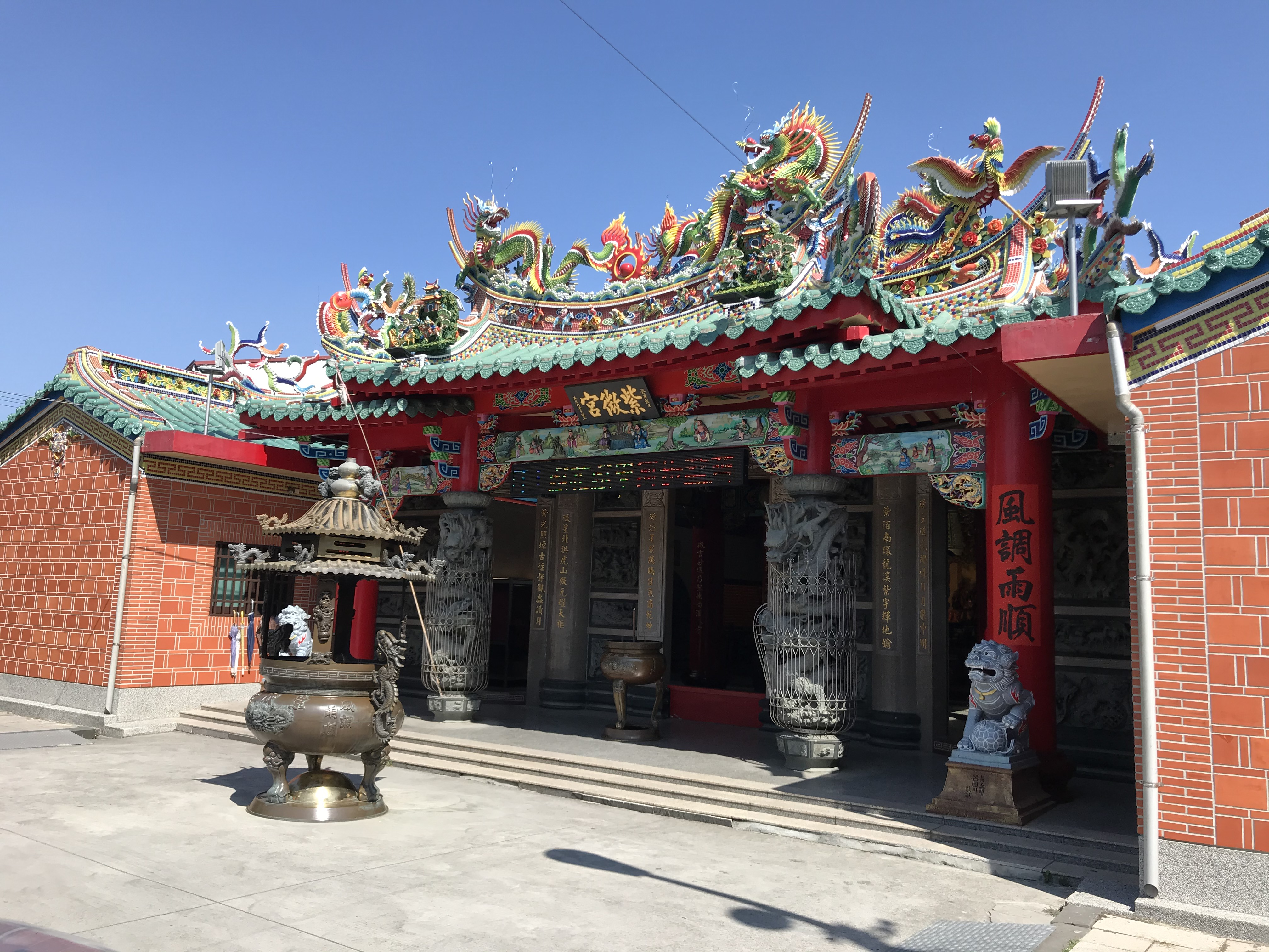 草屯紫微宮斜照